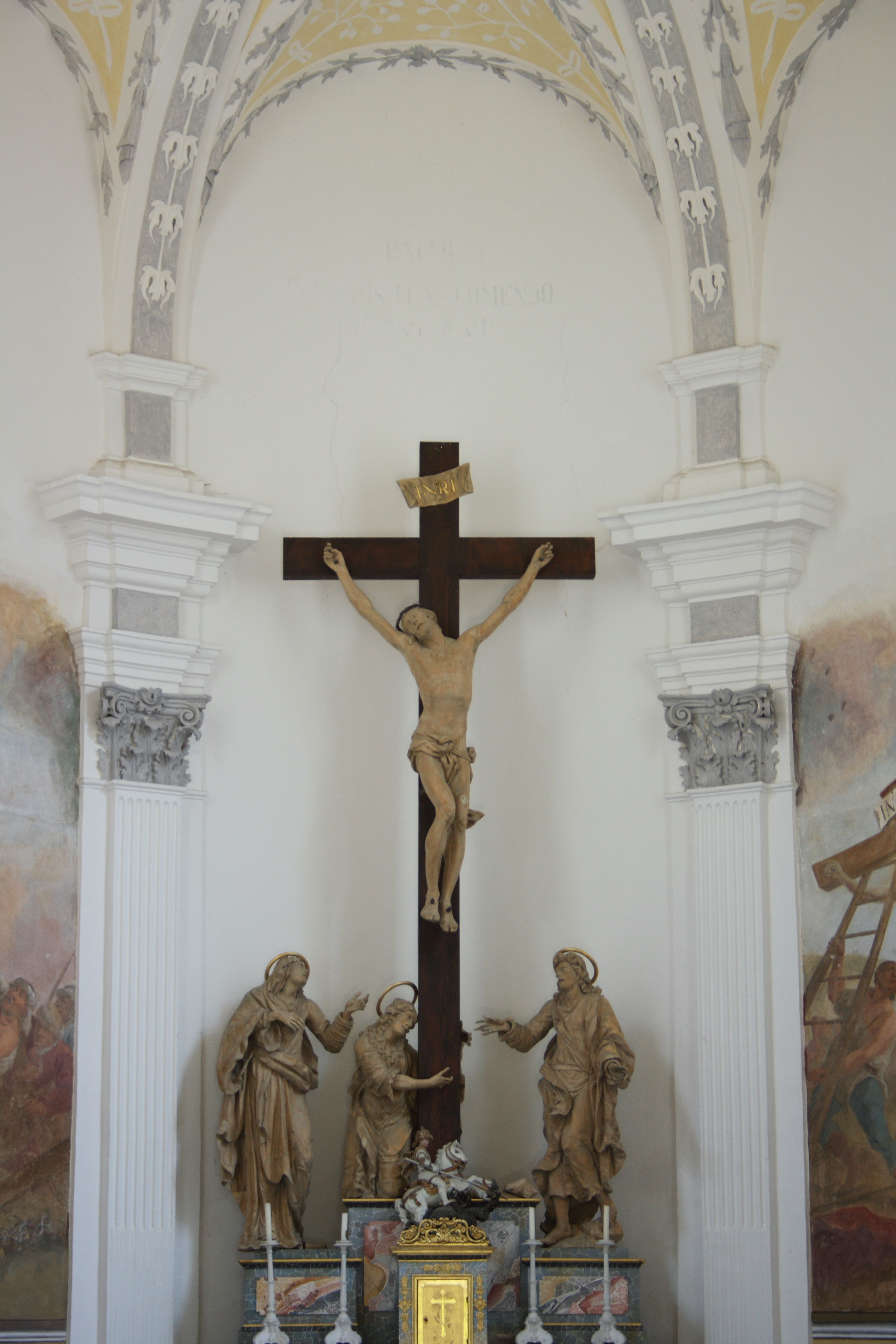 Katholische Kirche St. Matthias und Georg, Schloss Scherneck in Rehling, einer Gemeinde im Landkreis Aichach-Friedberg (Bayern), 1702 bis 1709 erbaut, Kreuzigungsgruppe um 1730/40